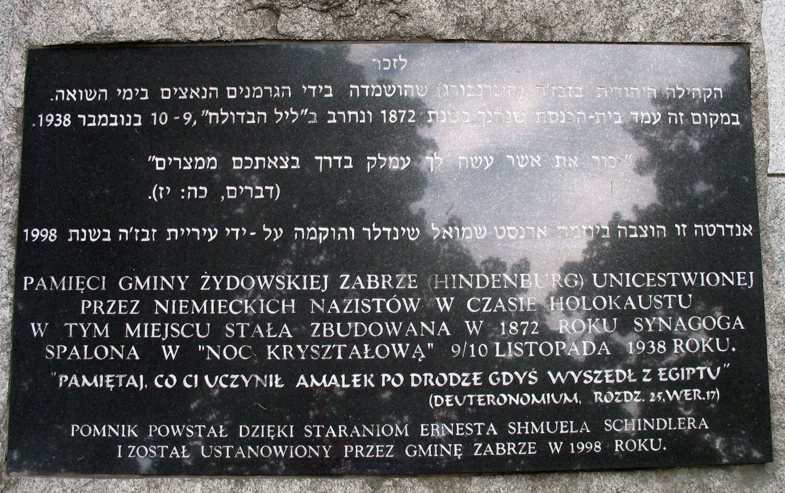 Granitowa bryła z tablicą pamiątkową znajdująca się w miejscu zburzonej w 1938 synagogi